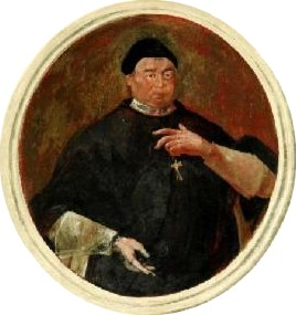 Hartmann Fortunát (1714-1779) opat v plasském kláštěře